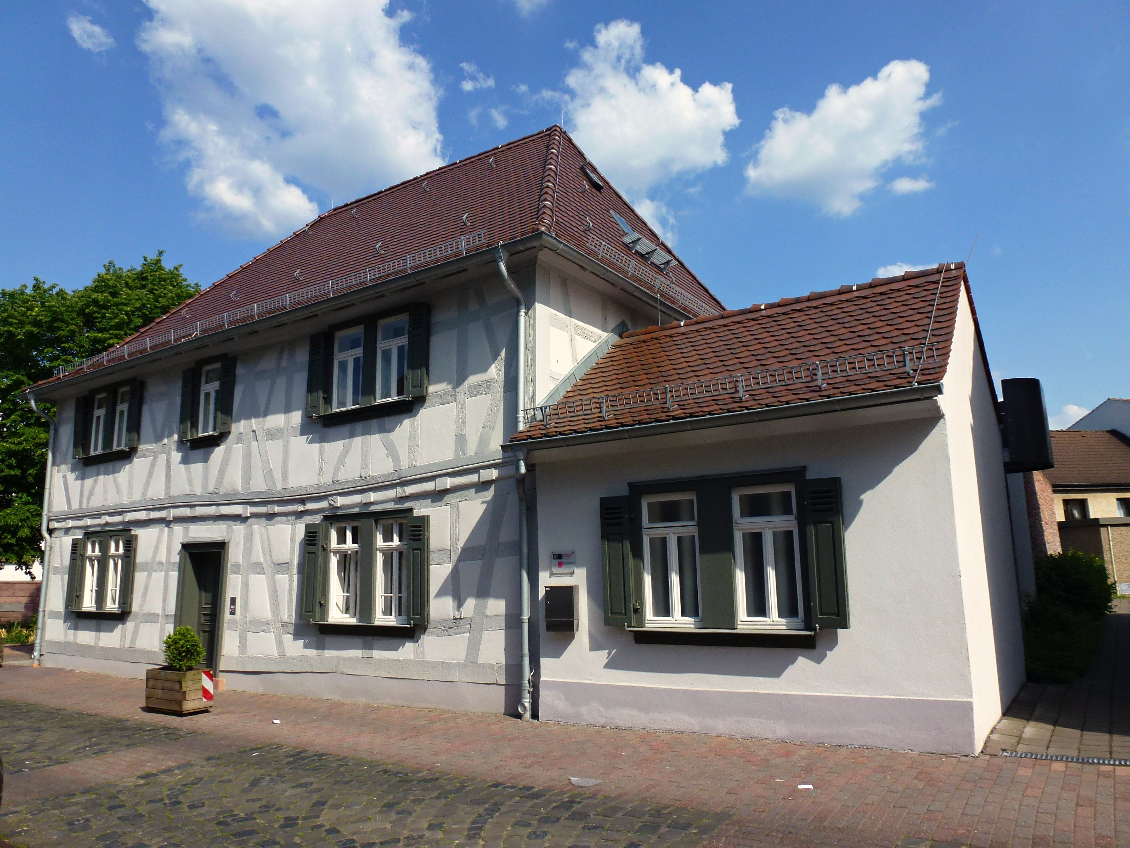 Die Französische Schule in der Pfarrgasse 29 in Neu-Isenburg. Ursprünglich errichtet 1704.This is a photograph of an architectural monument.